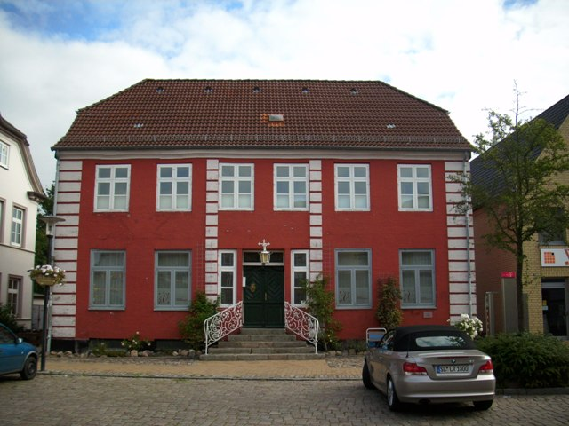 Frederiksgade i Slesvig